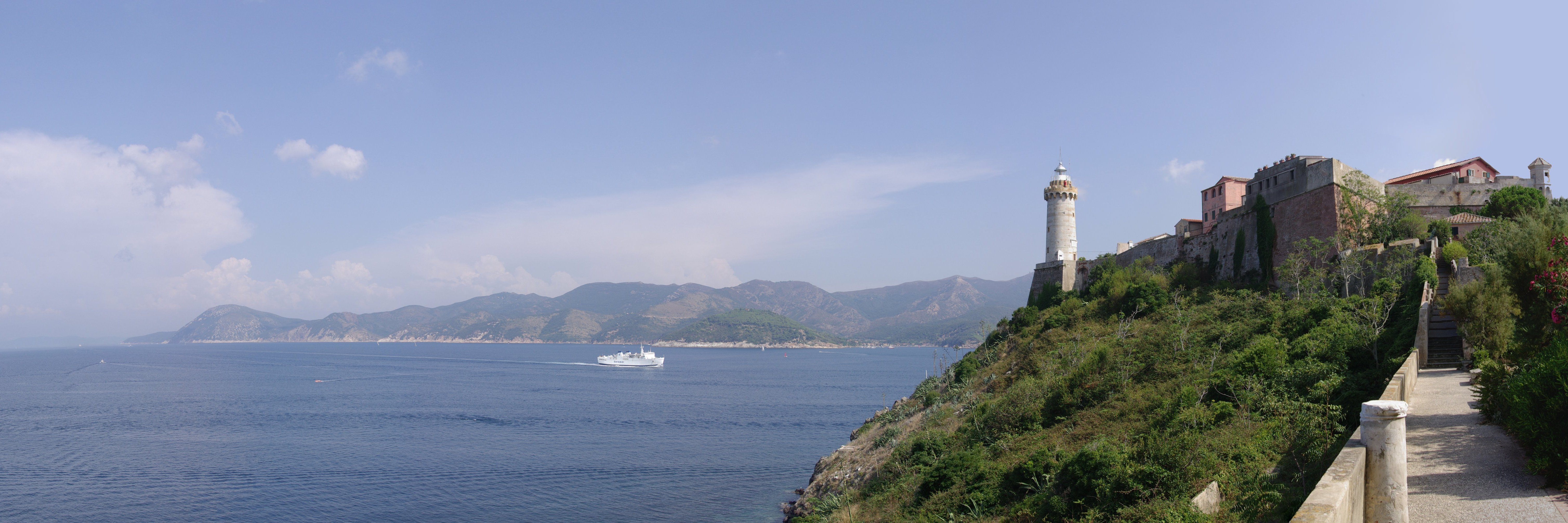 Blick vom Garten der Palazzina dei Mulini in Portoferraio nach Osten, rechts der Leuchtturm von Portoferraio und die Festungsanlage Forte Stella